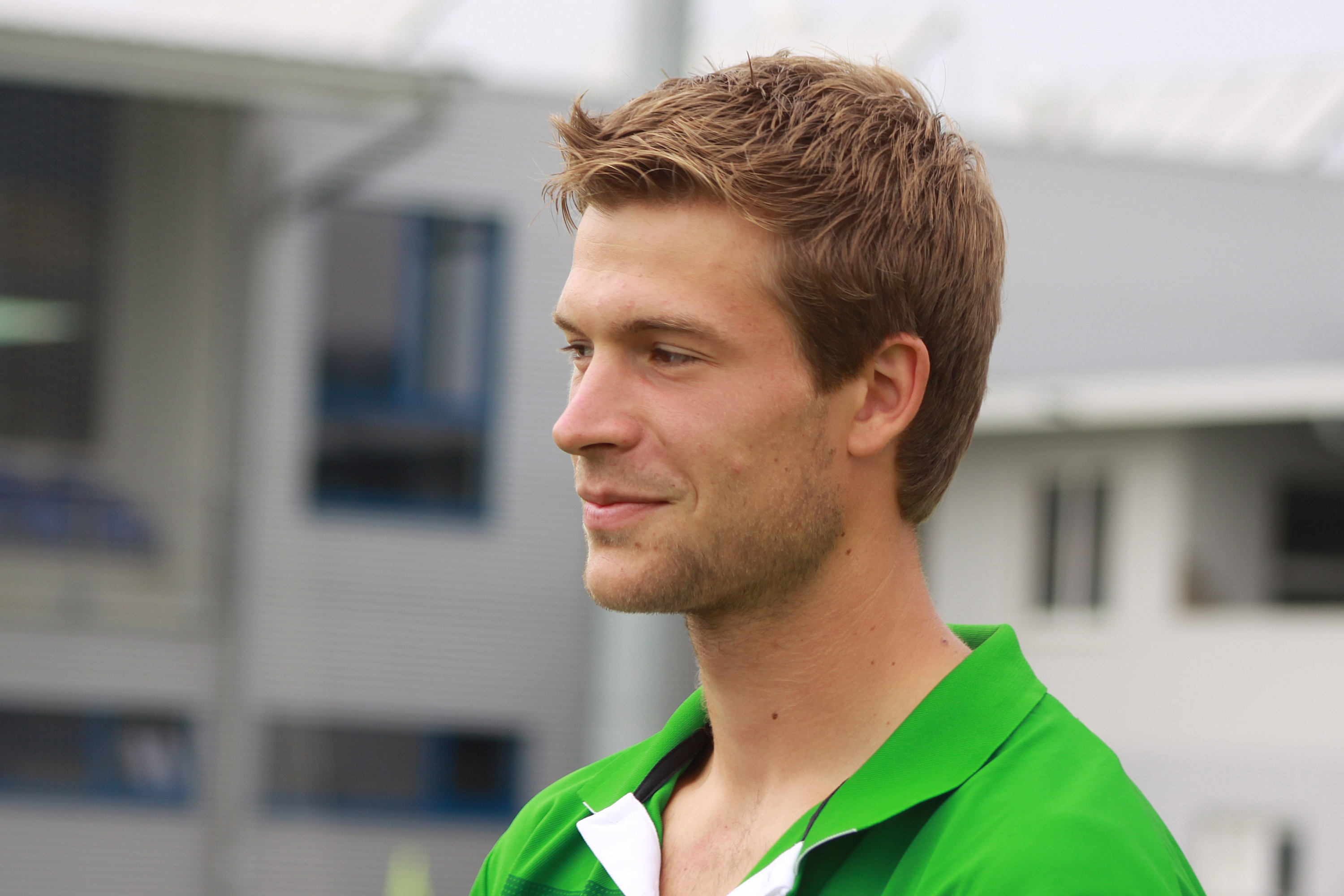 Márkó Futács - SV Werder Bremen (2)